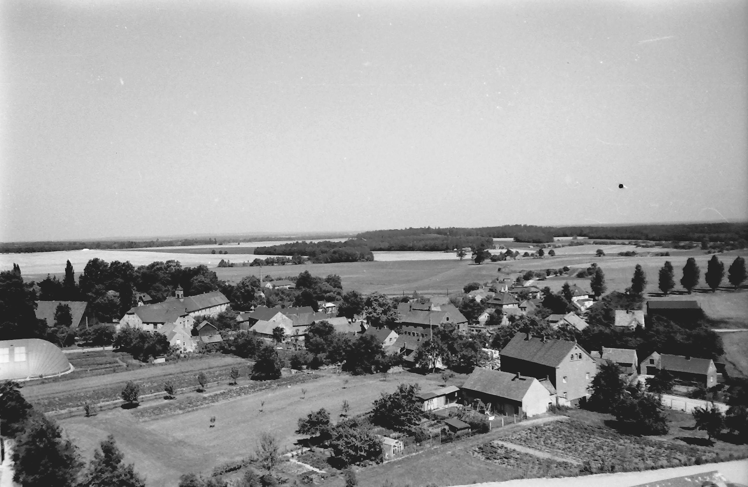 Hornjoserbsce: Napohlad Bóšic w lěće 1976